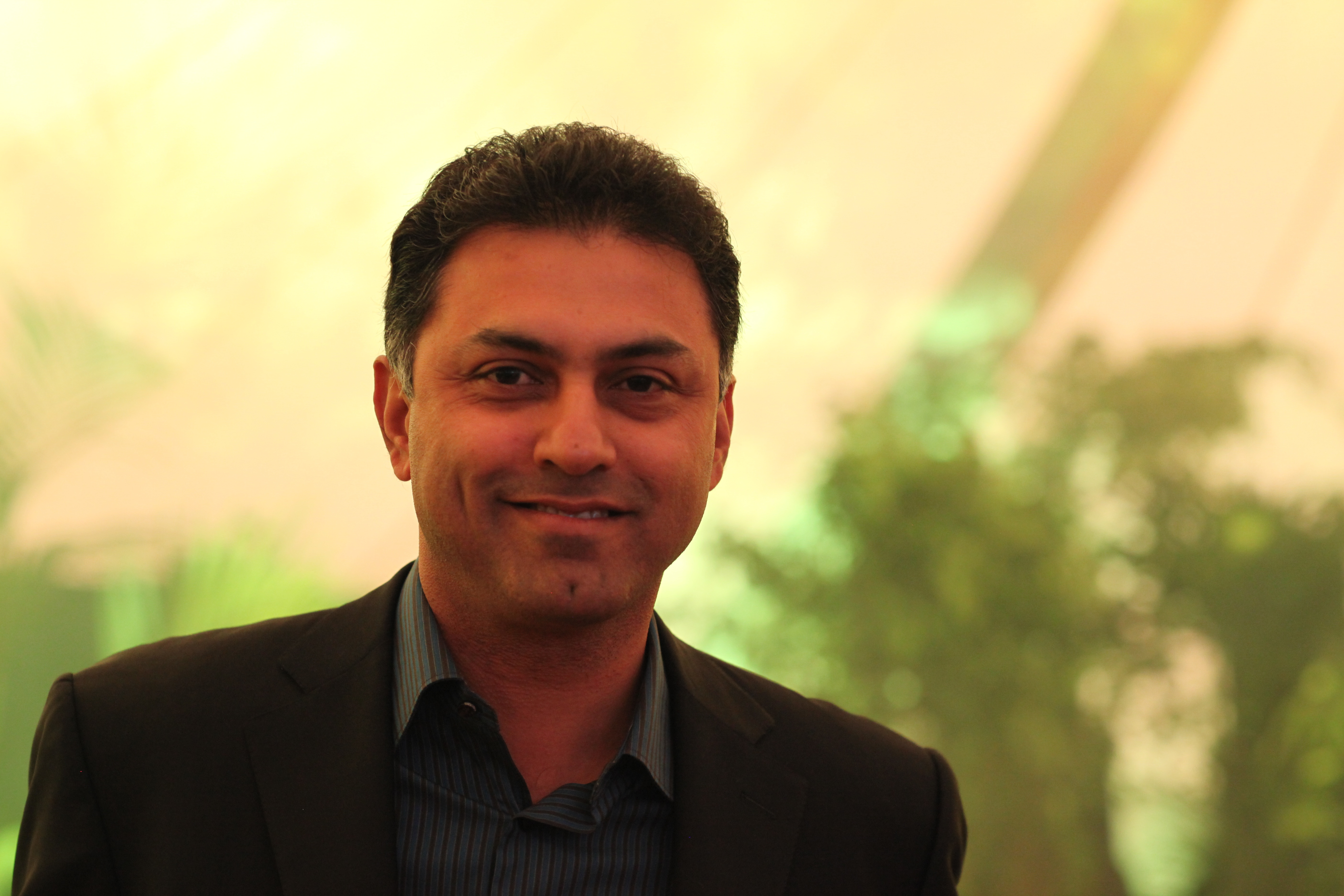 Google Zeitgeist 2009